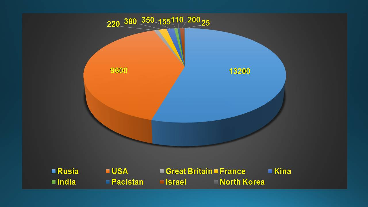 Српски (ћирилица): Број атомских бомби